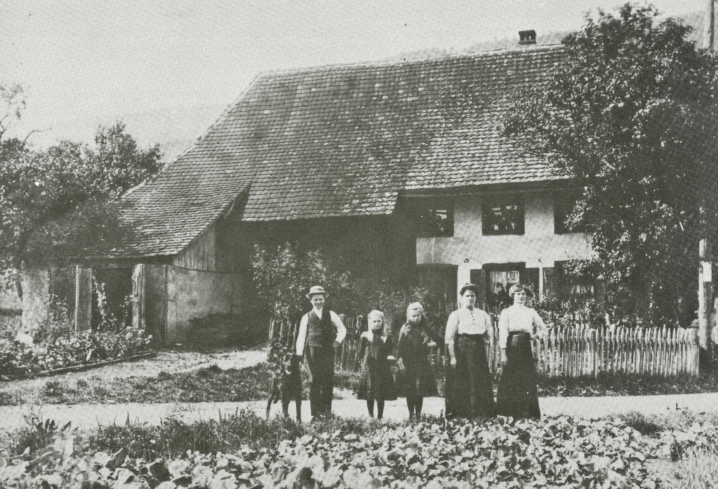 Pedro Meier Atelier – im Geburtshaus von Gerhard Meier in Niederbipp alias Amrain 1913 (vier Jahre vor Gerhard Meiers Geburt). Foto Archiv © Pedro Meier